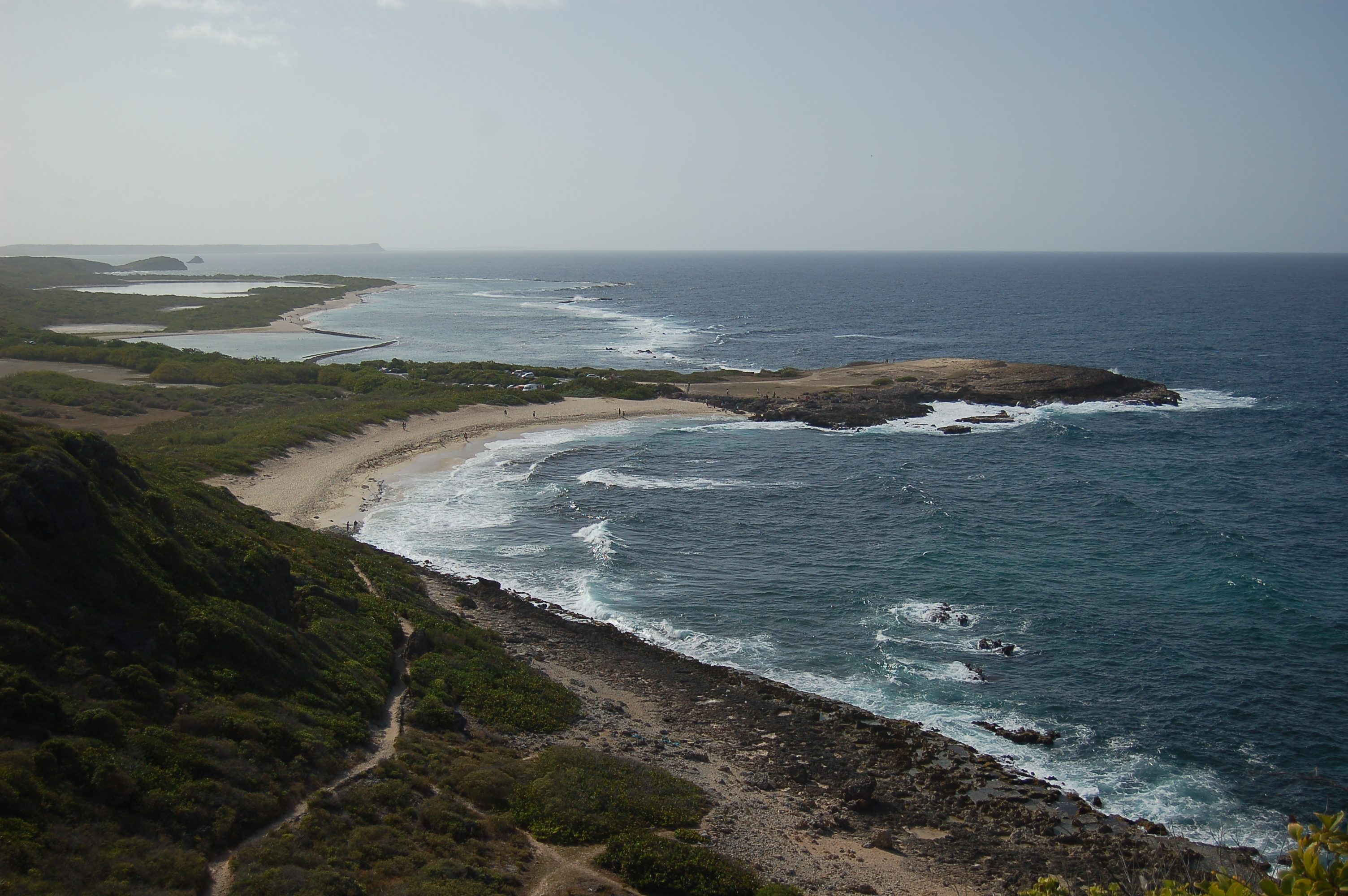 Plage des Grande Salines, vue depuis la Pointe des Châteaux, Guadeloupe